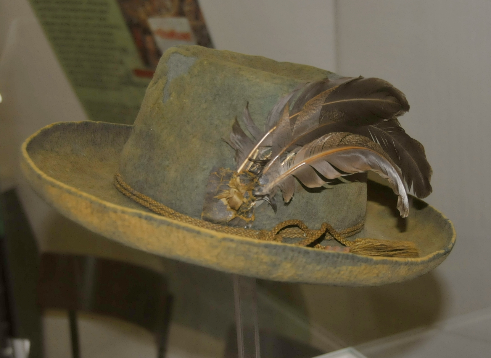 Hut des Schinderhannes